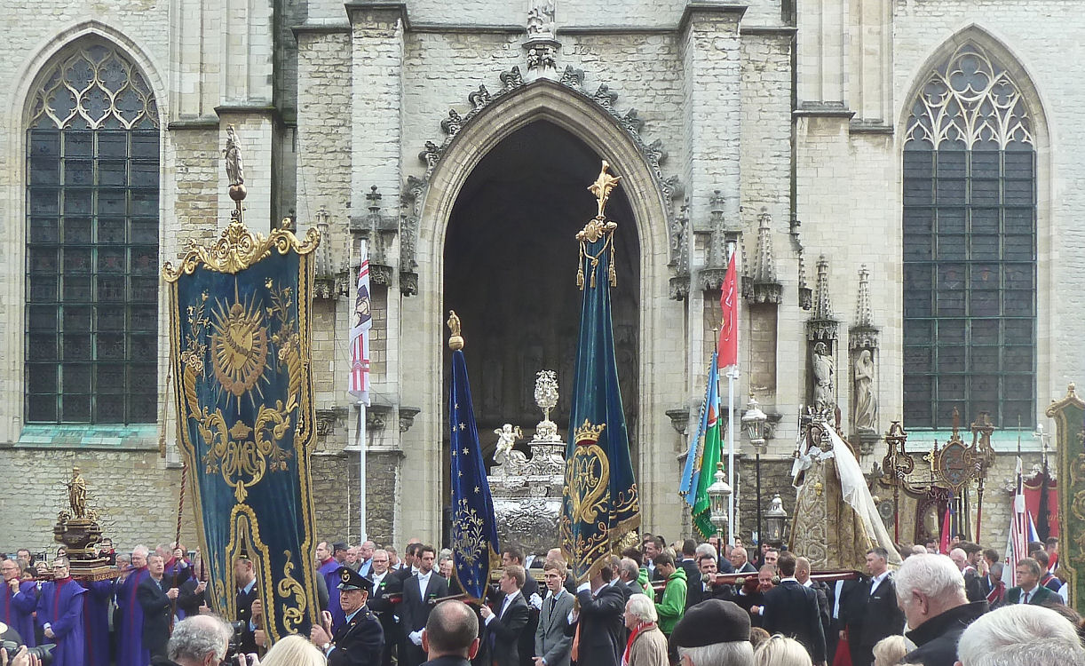 Sanctus Gummarus Lyrmensis